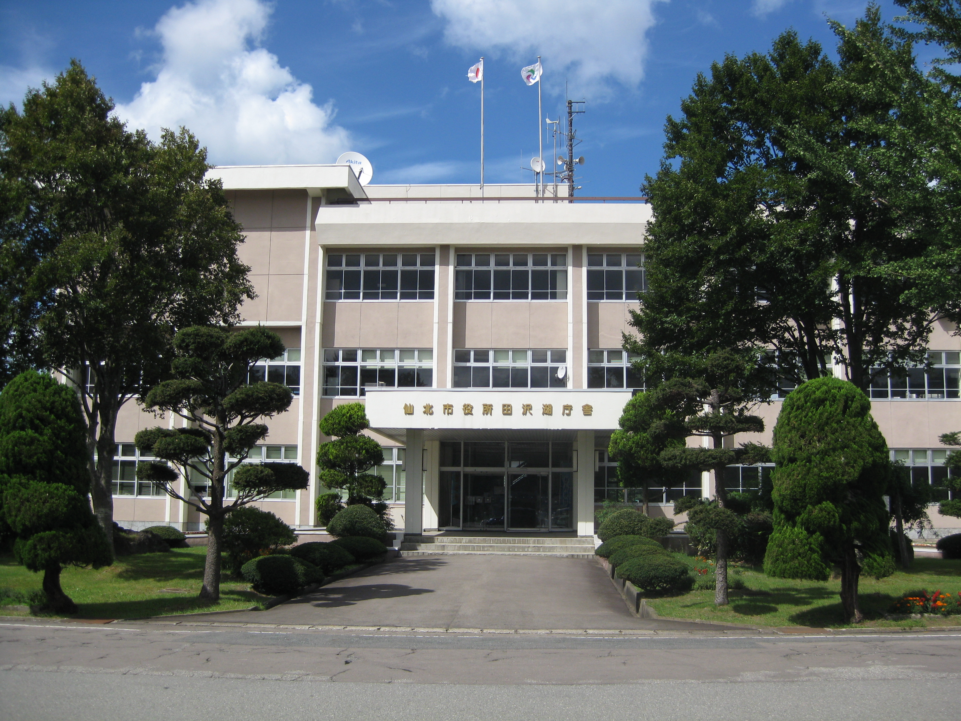 仙北市役所